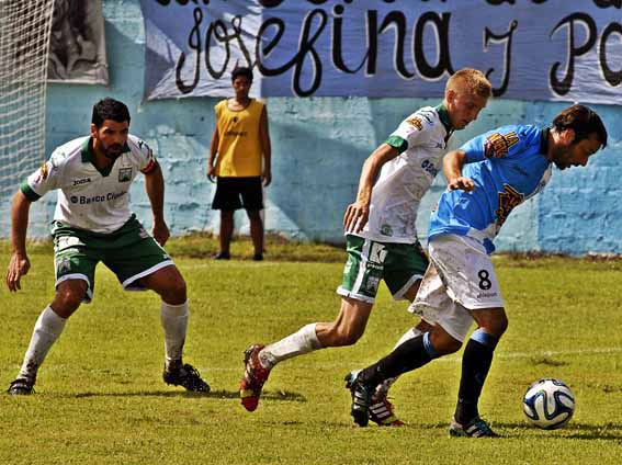 Villa San Carlos, en su primera participación en la Primera B Nacional, enfrentando a Ferro Carril Oeste, de local, en un partido correspondiente a la 28° fecha del campeonato 2013/14.